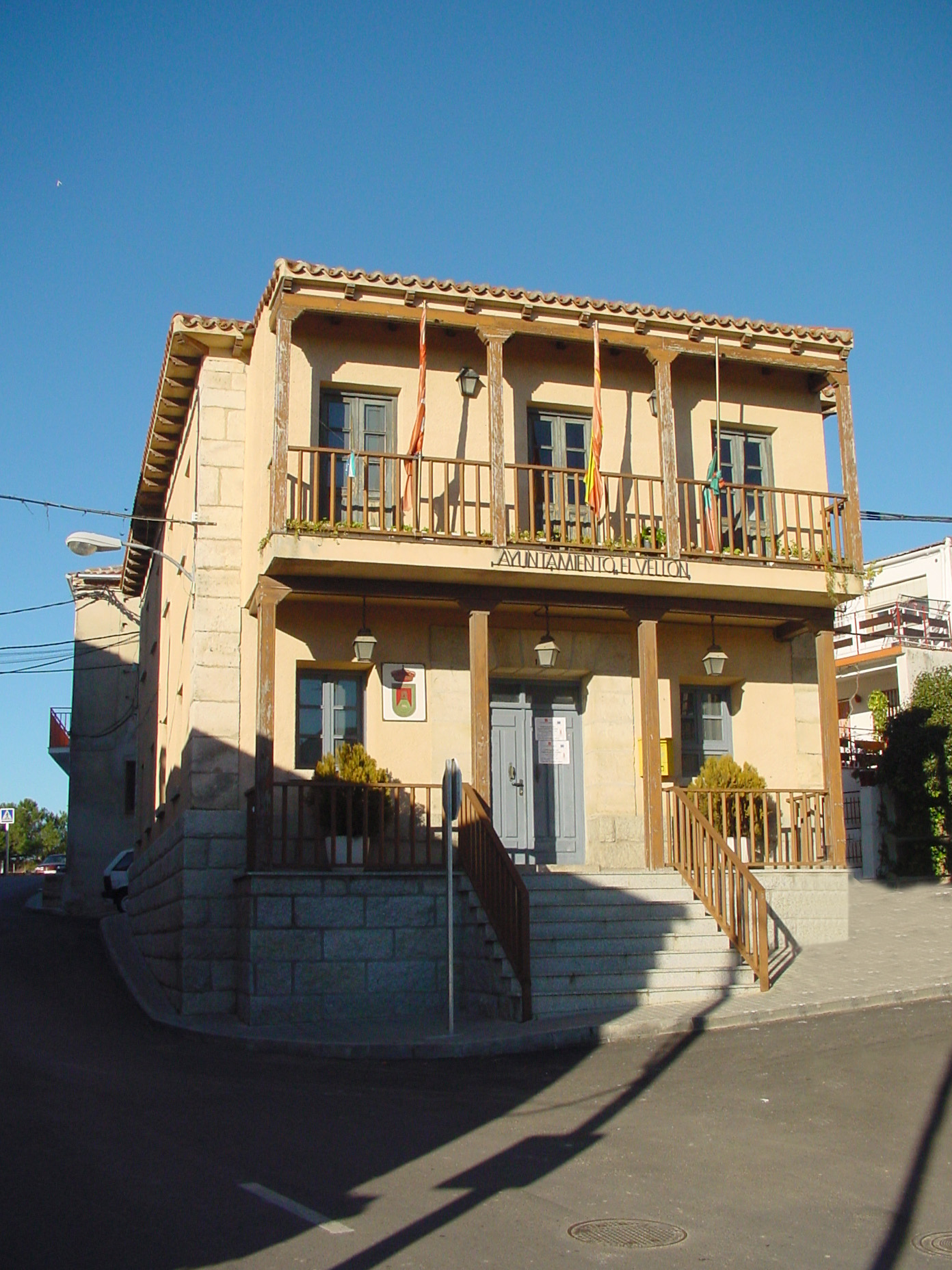 Ayuntamiento de El Vellón.